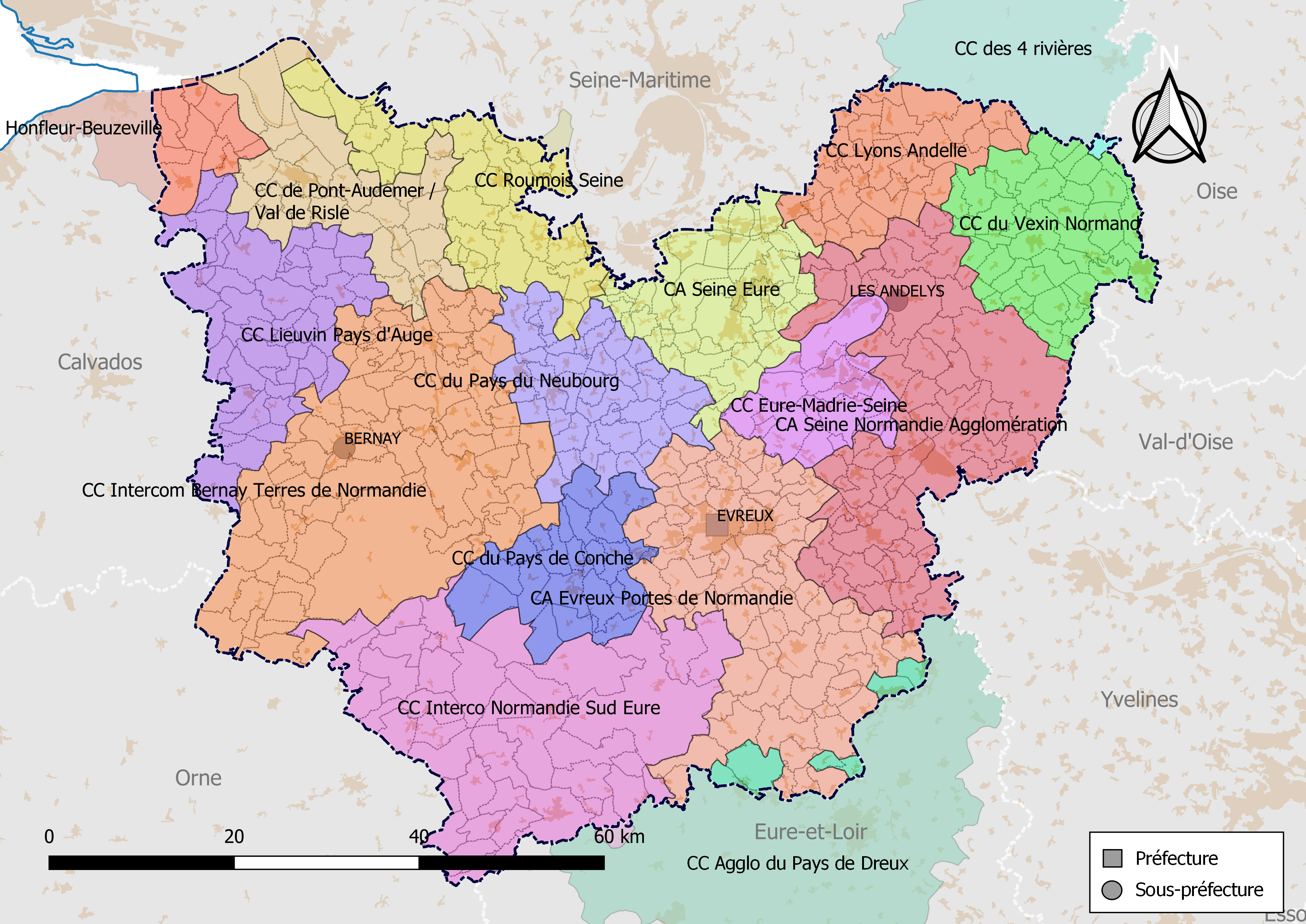 Carte des intercommunalités du département de l'Eure, France. Composition au 1er janvier 2019.